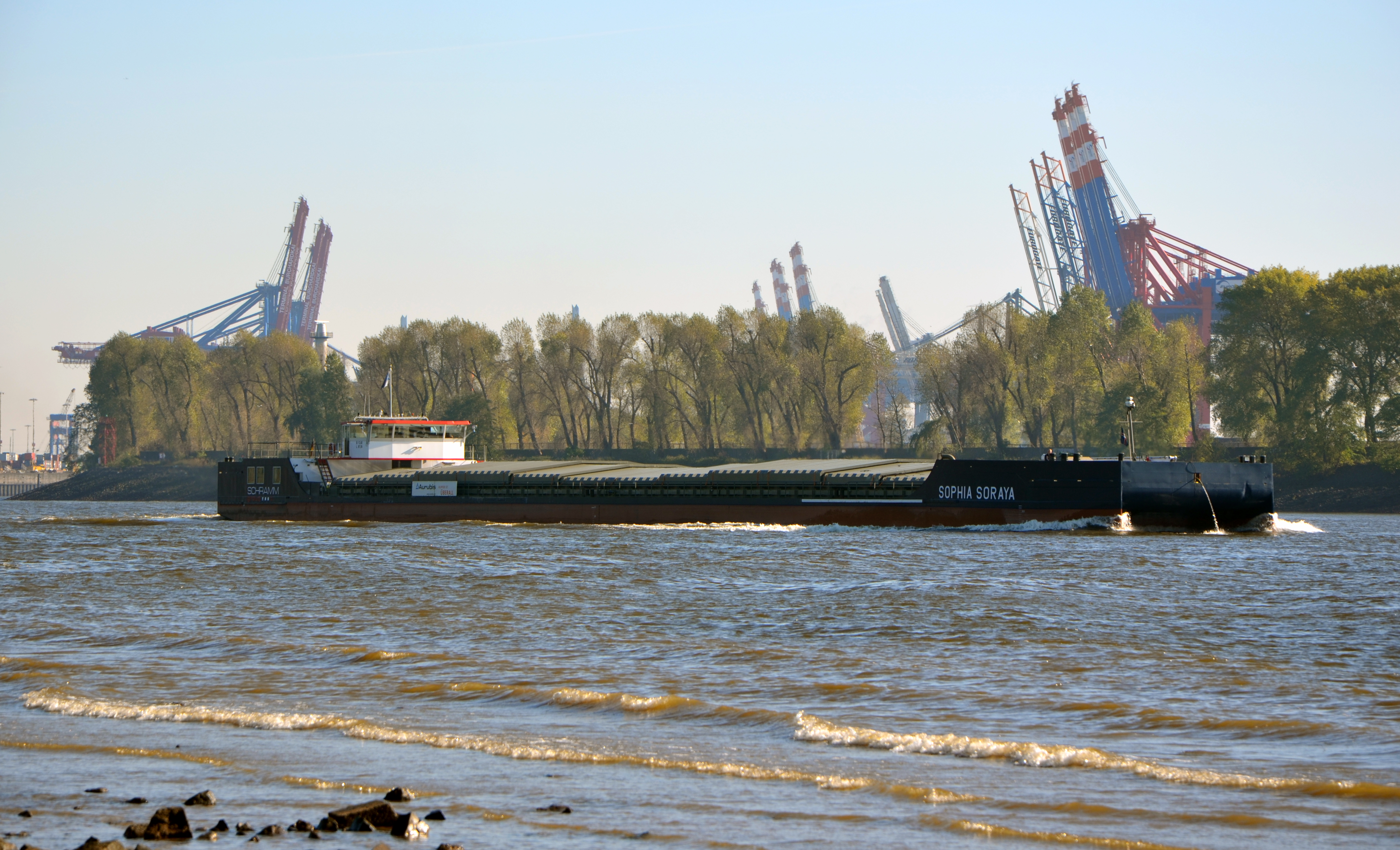 Futura Carrier "Sophia Soraya" Typ FC-975